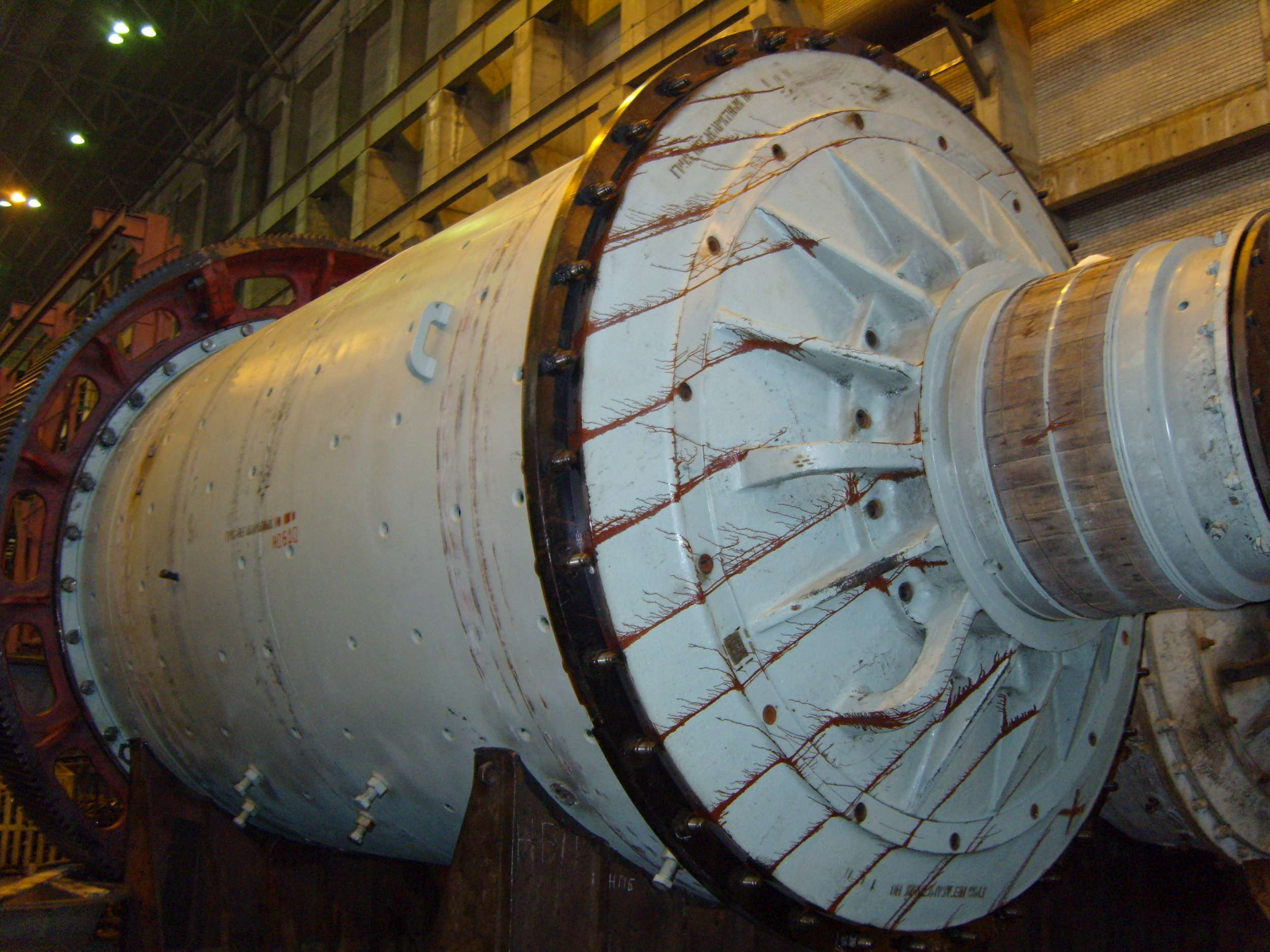 Корпус мельницы